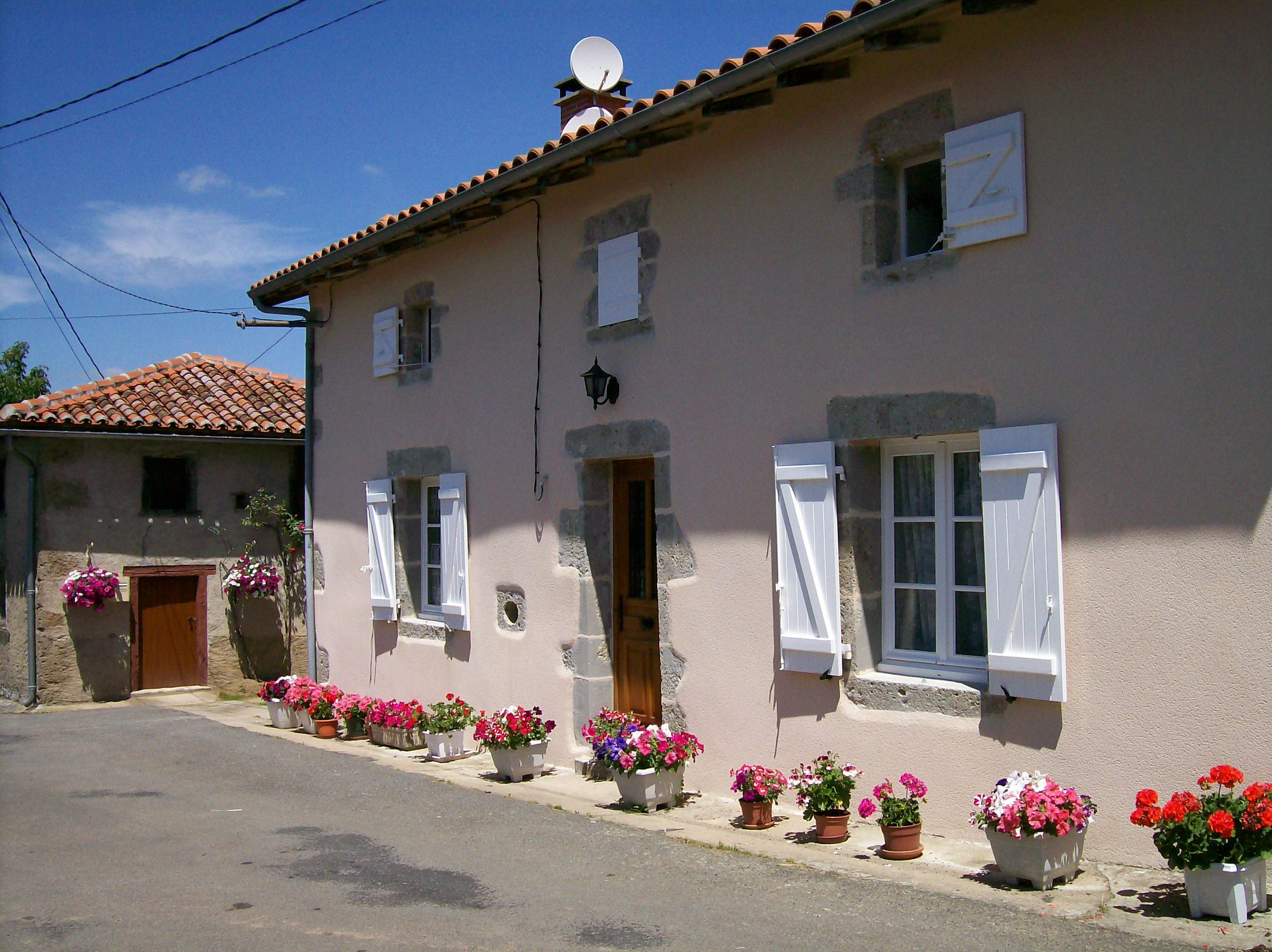 Entrée du hameau de Chez Martin, commune de Pressignac, Charente, France.